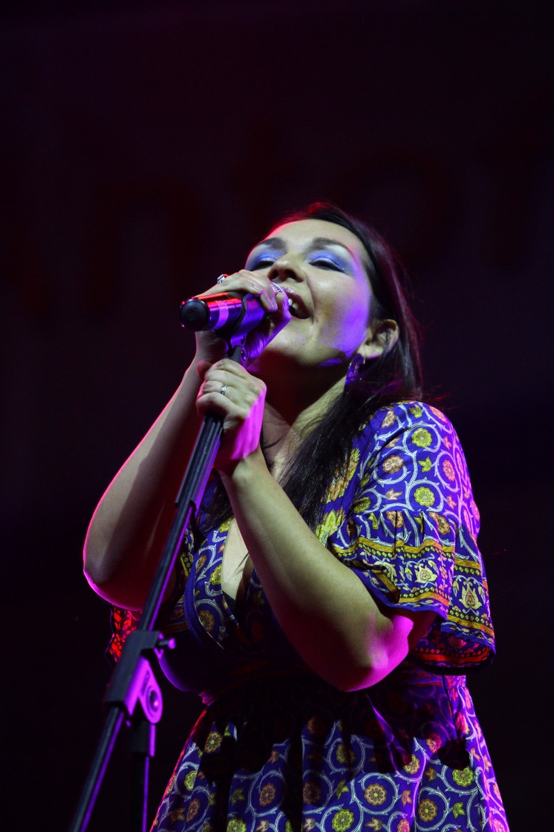 Denisse Malebrán en la celebración del Bicentenario en el balneario municipal de Antofagasta.